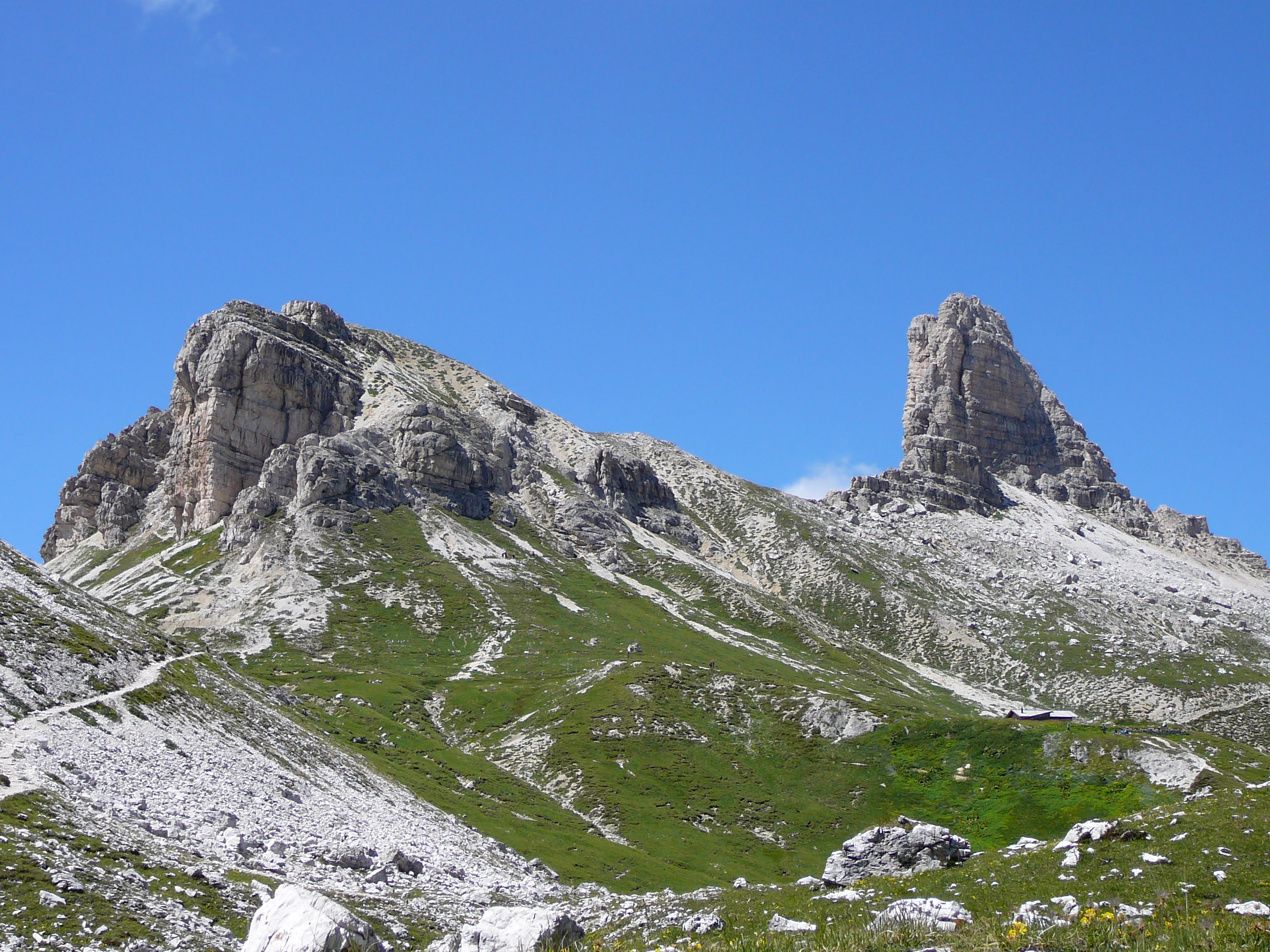 A sinistra il Sasso di Sesto. A destra la torre di Toblin